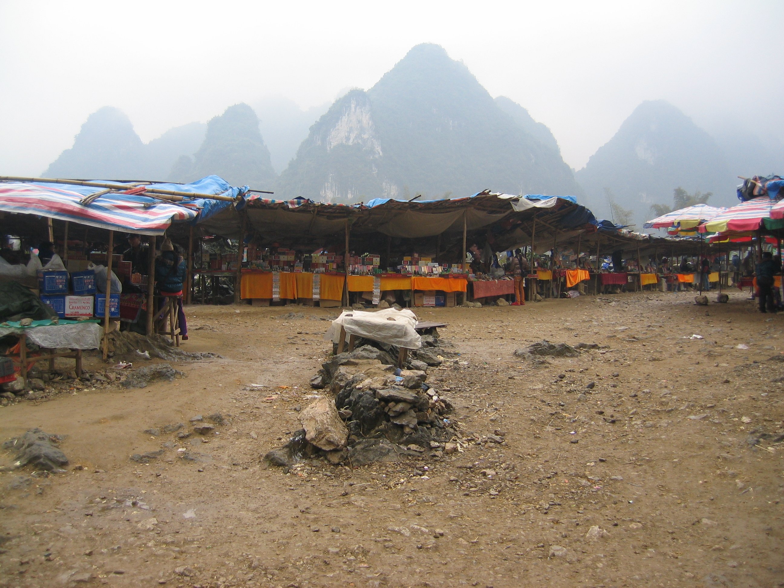 Khu "ki-ốt" thác Bản Giốc phía Việt Nam